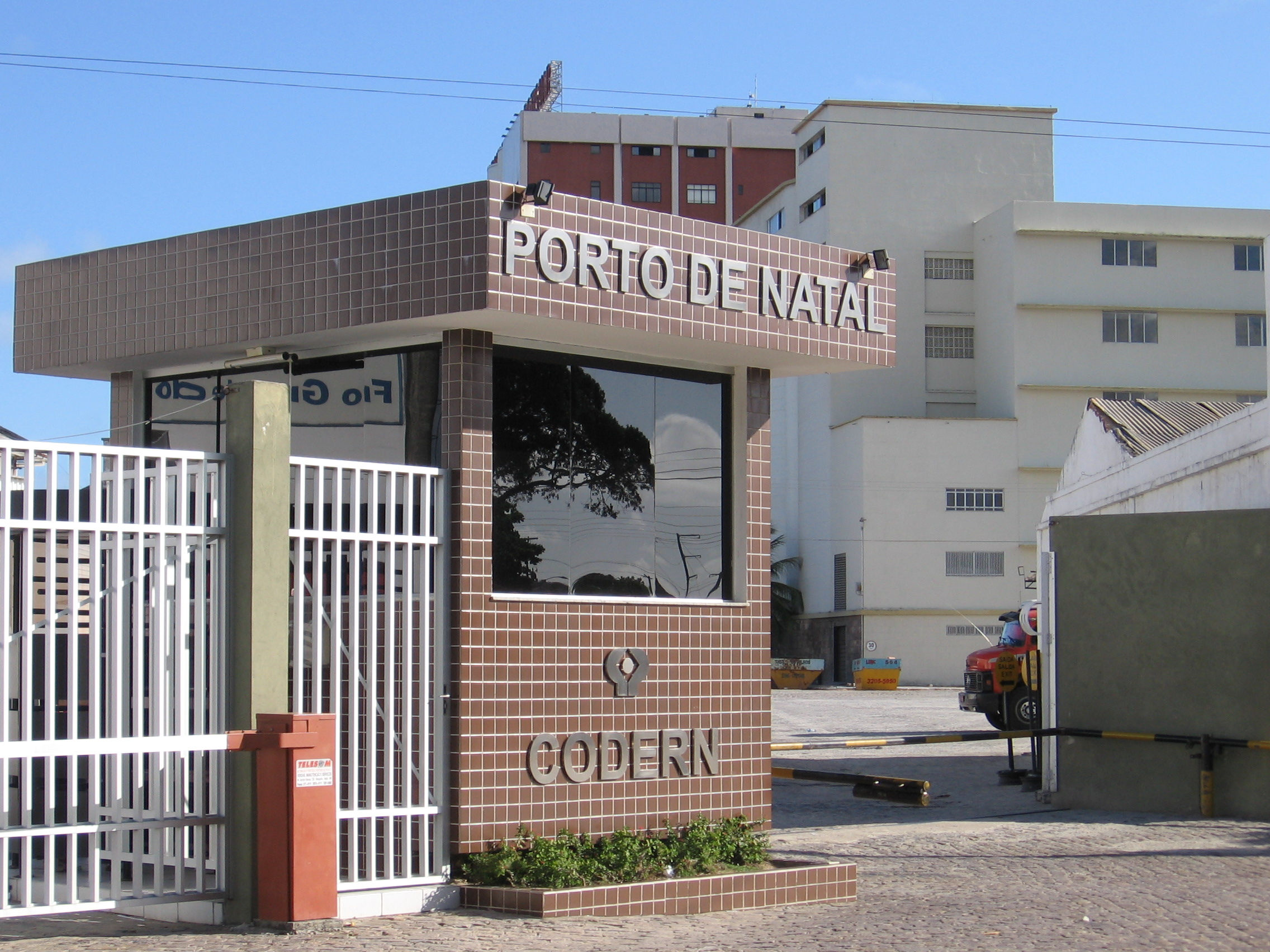 Porto de Natal no Rio Grande do Norte, Brasil pelo Flickr Port of Natal, Rio Grande do Norte, Brazil for the Flickr